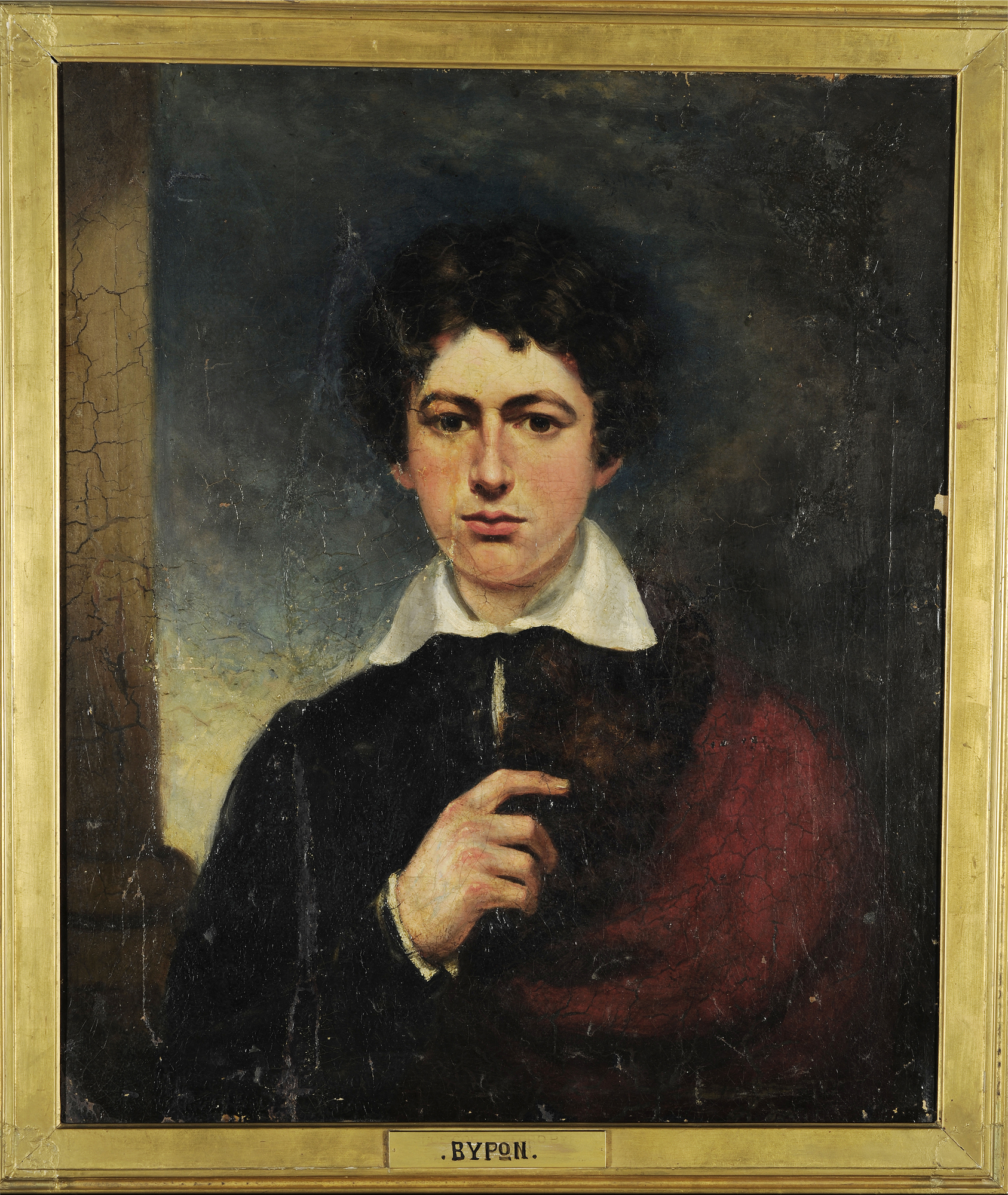 Ο λόρδος Byron σε ηλικία 16 ετών, έργο αγνώστου, ελαιογραφία σε μουσαμά, 76Χ 63 εκ. (3329) Εθνικό Ιστορικό Μουσείο.